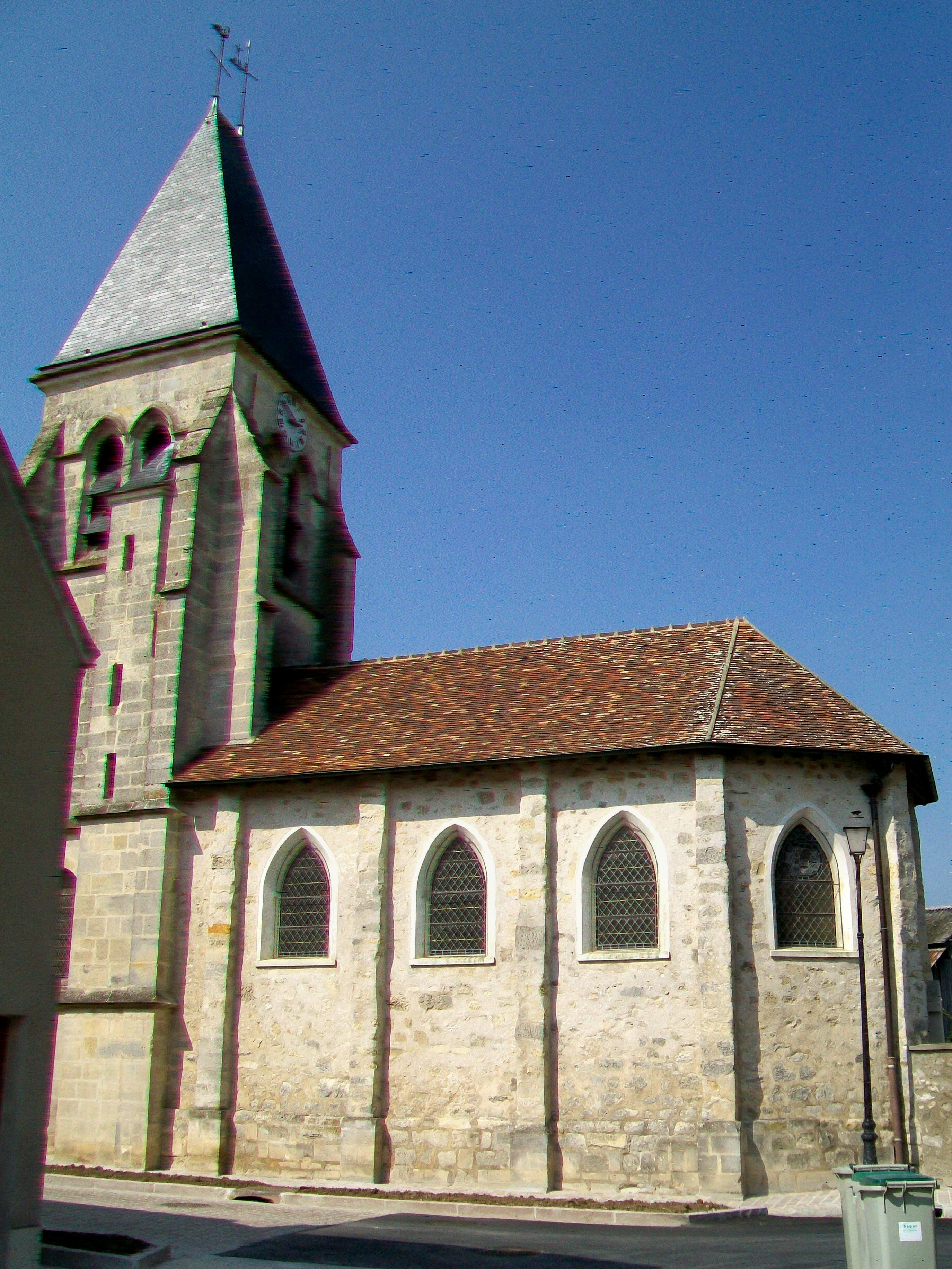 Vue depuis le sud - chemin du Martinet.